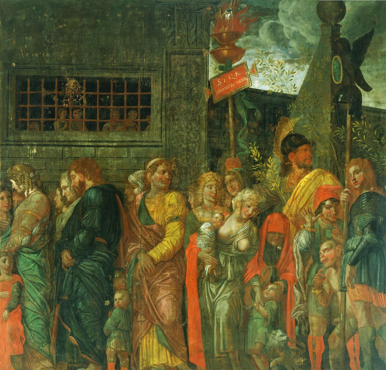 detail: captives